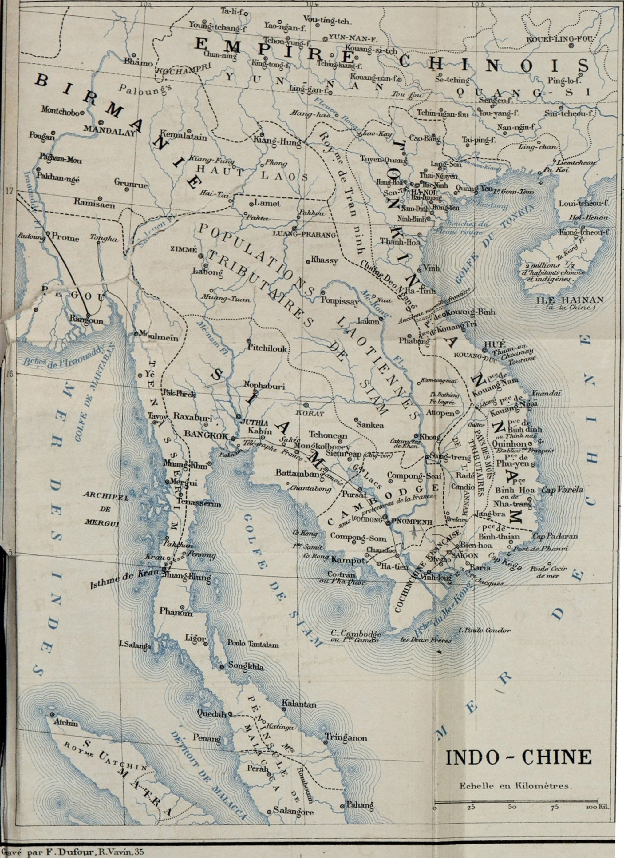 Bản đồ bán đảo Đông Dương (Indo-Chine) năm 1883-1884. (trích từ bản đồ TonKin1883)